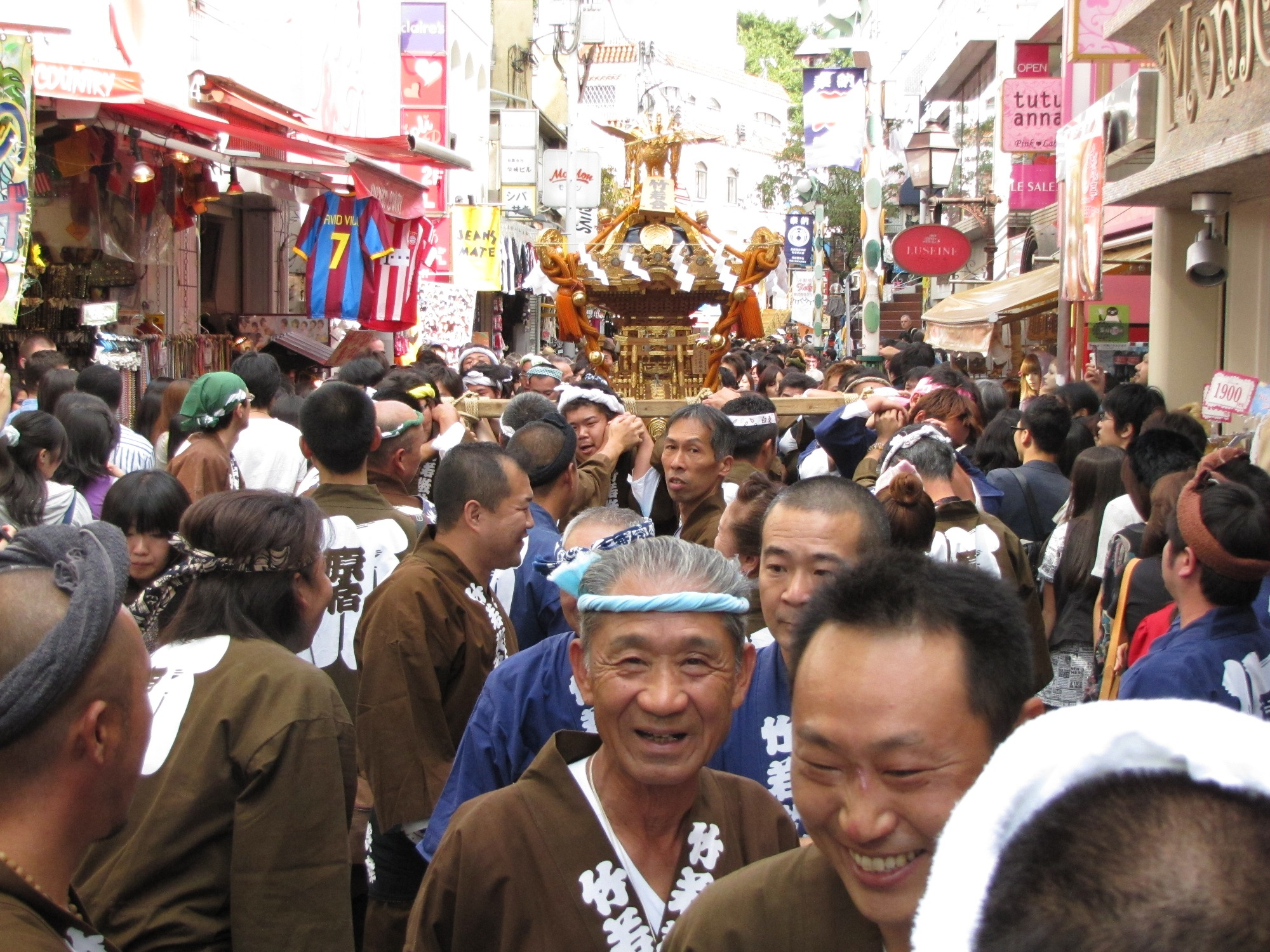 פסטיבל מאטסורי בטוקיו